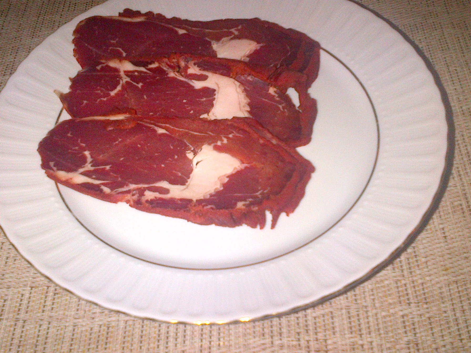 Pastırma turco.